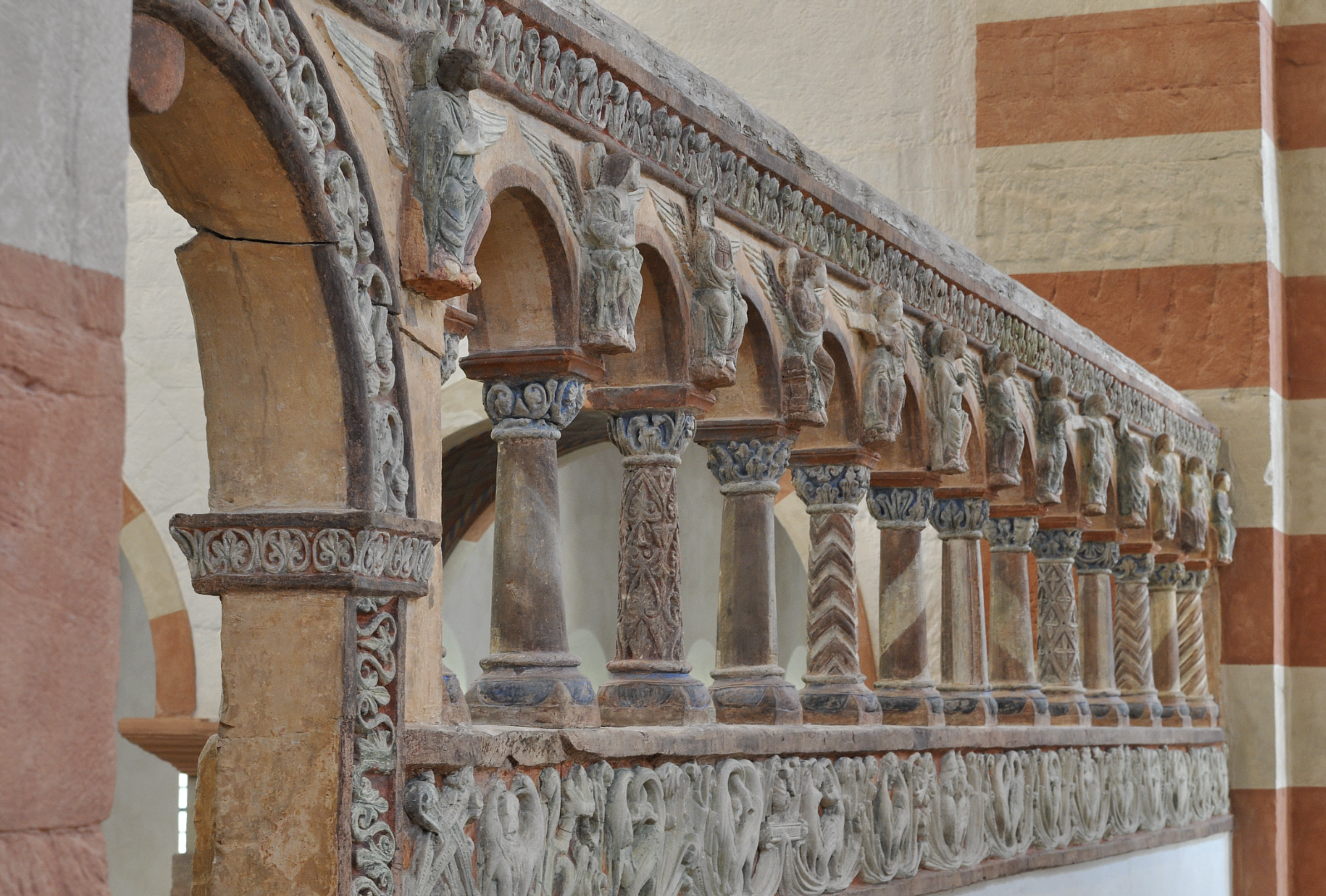 Chorschranke im westlichen Querschiff von der Vierung aus gesehen